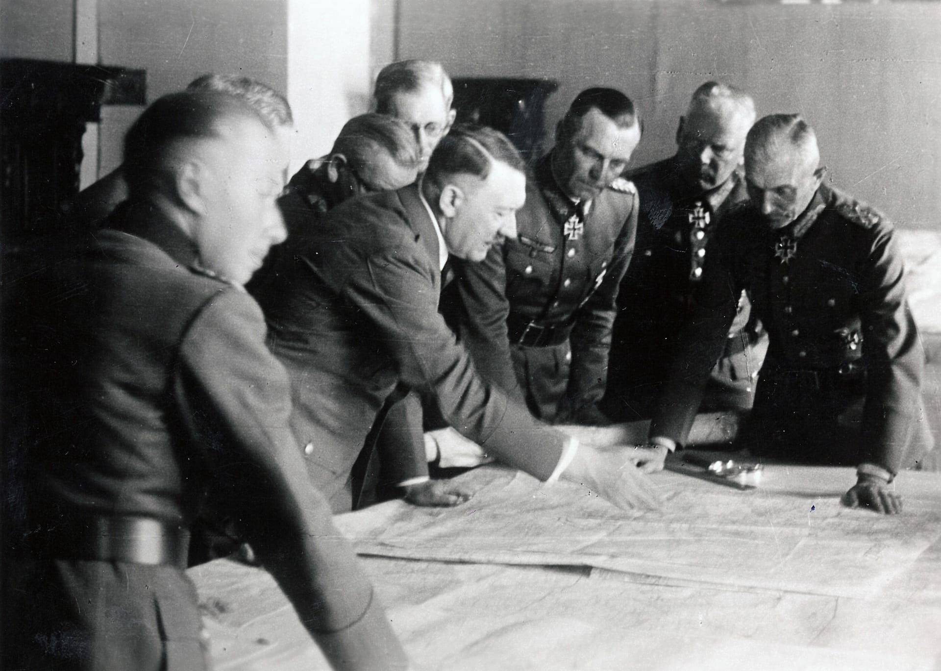 Hauptquartier Heeresgruppe Süd, Lagebesprechung Zentralbild An der Ostfront, 1. Juni 1942 Adolf Hitler bei einer Lagebesprechnung im Hauptquartier der Heeresgruppe Süd in Poltawa. Von links nach rechts: Generalleutnant Adolf Ernst Heusinger, General der Infanterie von Sodenstern, Generaloberst Max Freiherr von Weichs, Adolf Hitler, General der Panzertruppe Friedrich Paulus, Generaloberst Eberhard von Mackensen und Generalfeldmarschall Fedor von Bock. Juni 1942 Abgebildete Personen: Bock, Fedor von: Generalfeldmarschall, Ritterkreuz (RK), Heer, Deutschland (GND 119294796) Heusinger, Adolf: General, Inspekteur der Bundeswehr, Bundesrepublik Deutschland Hitler, Adolf: Reichskanzler, Deutschland Mackensen, Eberhard von: Generaloberst, Ritterkreuz (RK), Heer, Deutschland (GND 107585448) Paulus, Friedrich: Generalfeldmarschall, Oberbefehlshaber 6. Armee, Ritterkreuz (RK), Heer, Deutschland (GND 118739654) Sodenstern, Georg von: General der Infanterie, Ritterkreuz (RK), Heer, Deutschland (GND 128648376) Weichs, Maximilian von Freiherr: Generalfeldmarschall, Ritterkreuz, Heer, Deutschland (GND 117235202)